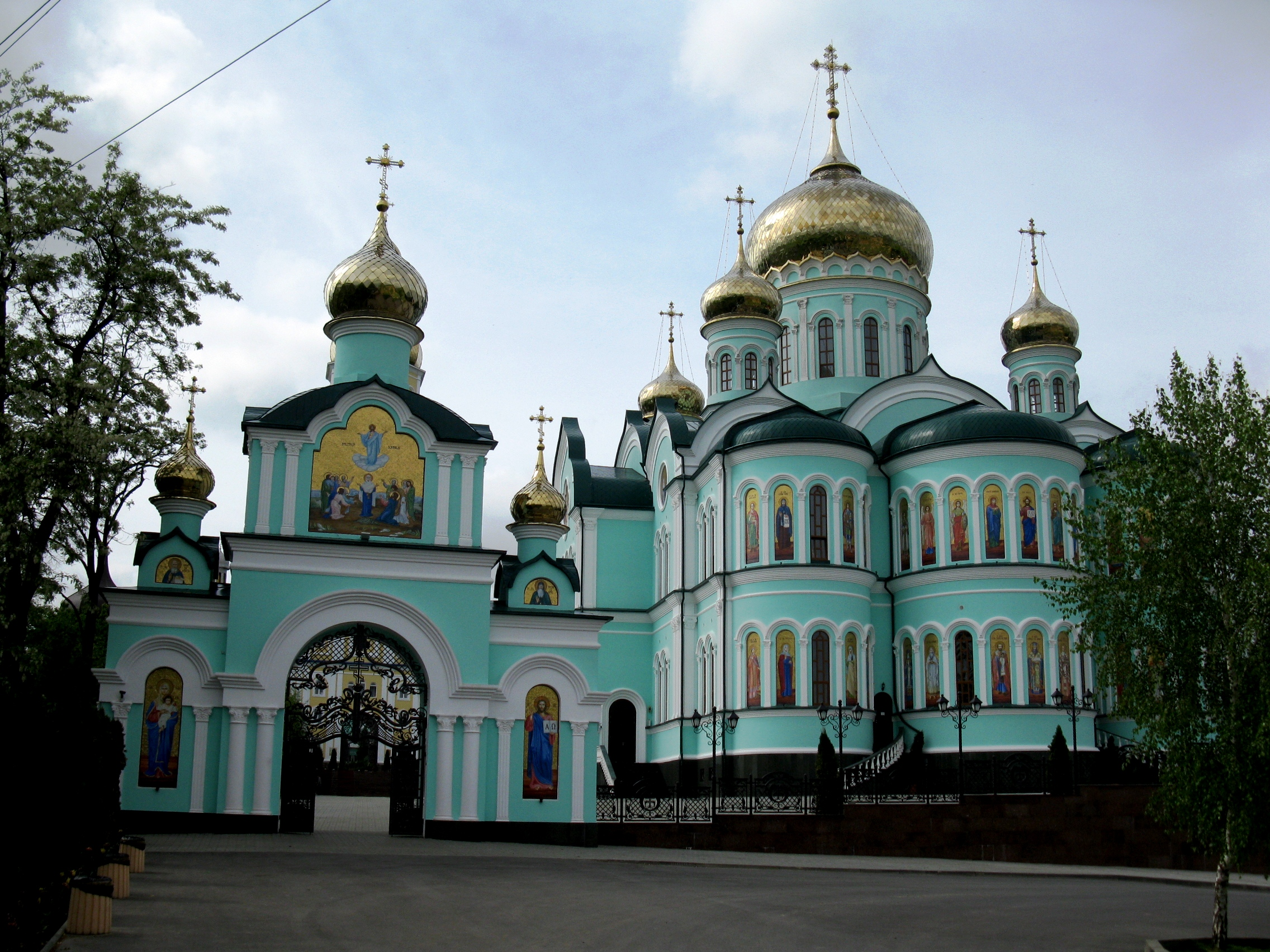 Банченский монастир (Чернівецька область)